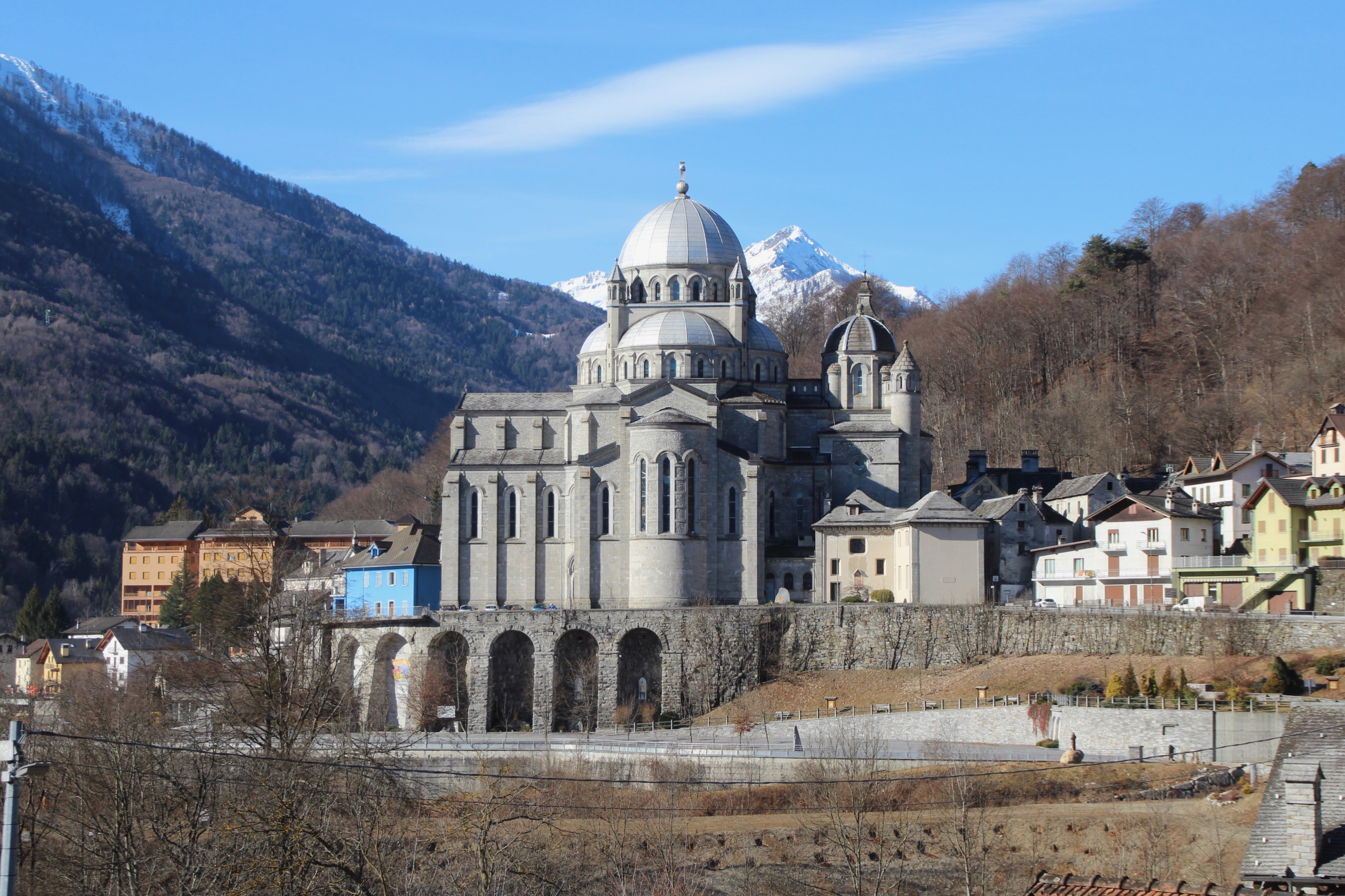 Madonna del Sangue in Re, Valle Vigezzo (Italien)